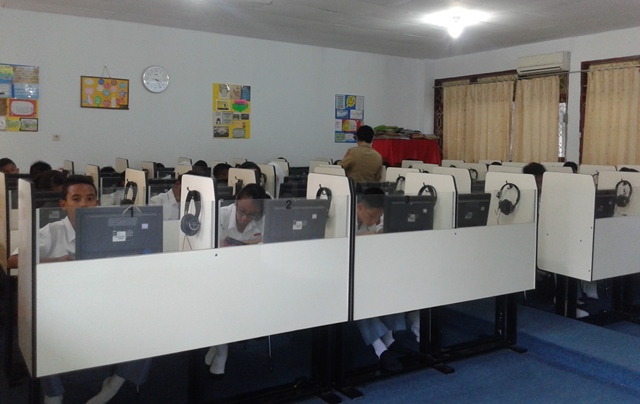 Siswa SMAN 1 Ambon sedang menggunakan fasilitas komputer.